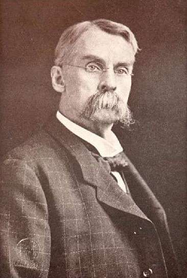 Portrait des US-amerikanischen Homöopathen James Tyler Kent. Er war Verfasser wichtiger homöopathischer Standardwerke und Lehrer an verschiedenen amerikanischen Ausbildungsstätten für Mediziner.